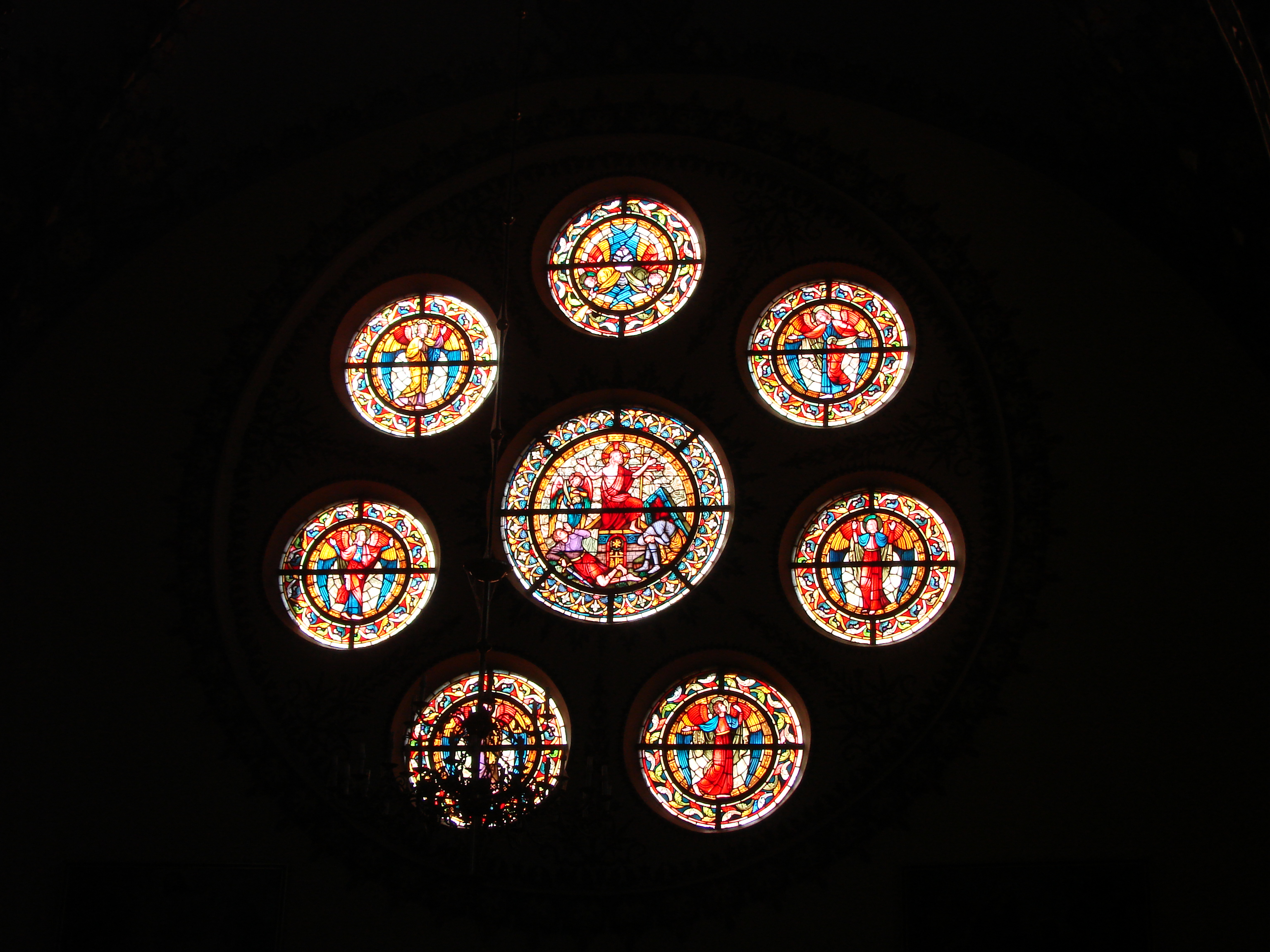 konkatedra św. Stanisława BM w Ostrowie Wlkp.